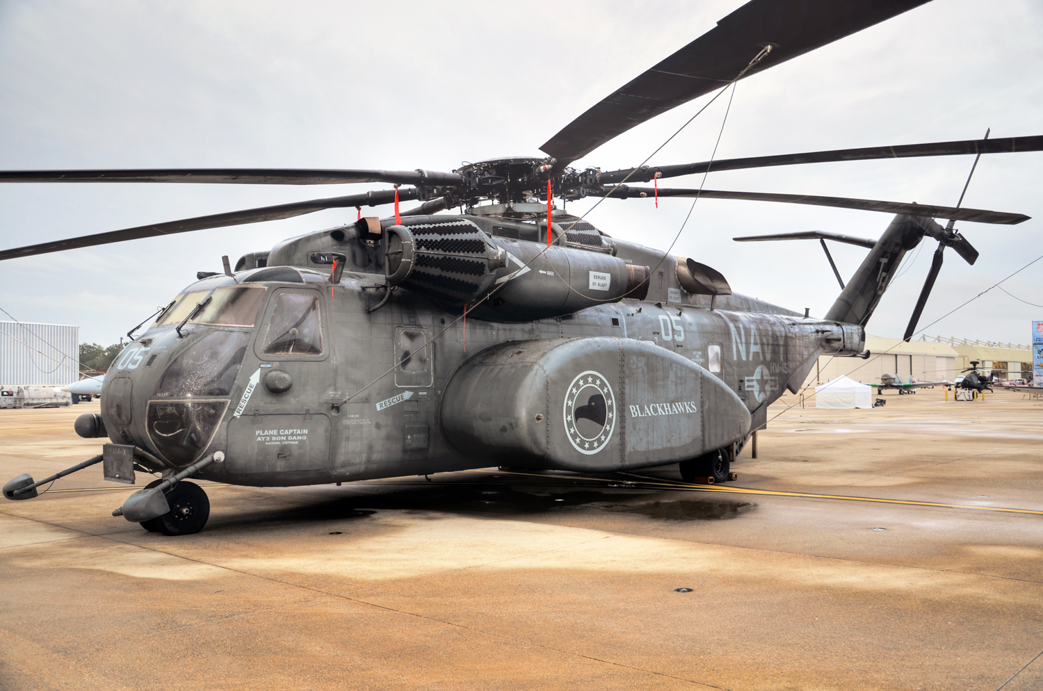 A U.S. Navy Sikorsky MH-53E Sea Dragon (BuNo 164766).